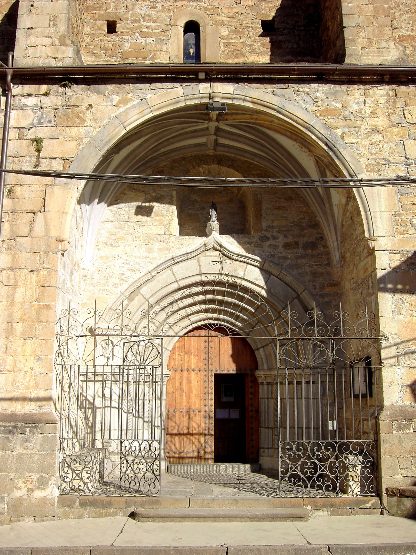 El pórtico d ela iglesia de San Pedro de Broto, en Huesca. Su estilo es transicional de gótico aragonés a renacentista.